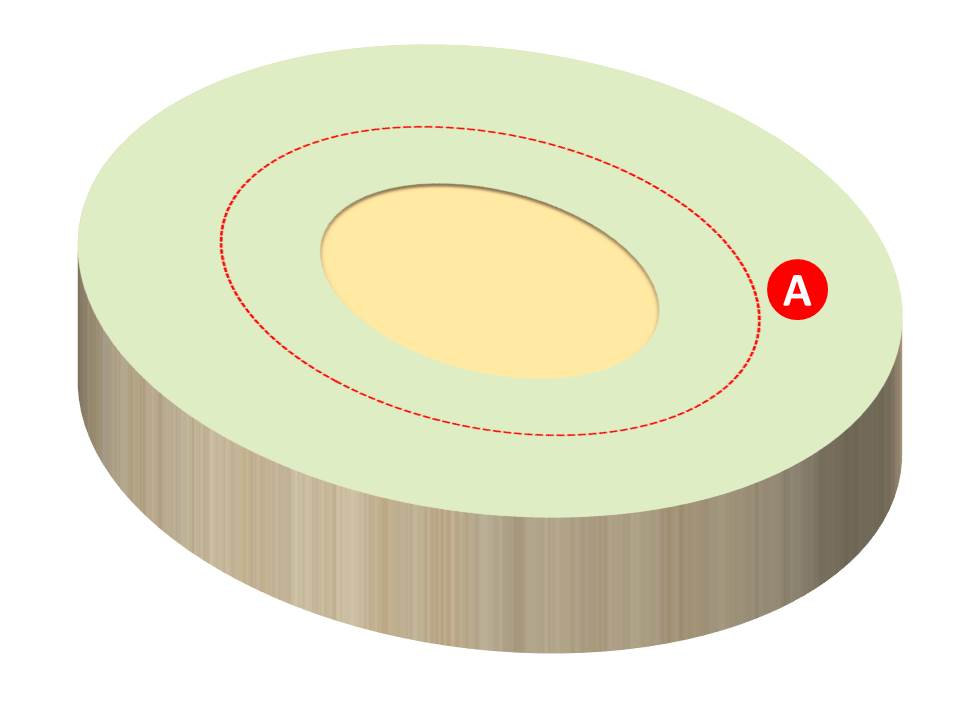 Amphithéâtre antique de Tours - phase 2